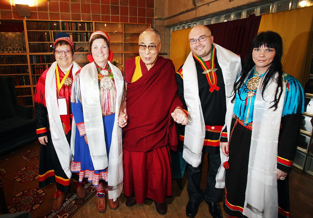 Marit Myrvoll, president Aili Keskitalo, HH Dalai Lama, Eldar Myrvoll Karlsen og Sara Marielle Gaup Beaska. Foto: Kenneth Hætta